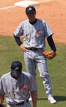 Shinya Miyamoto